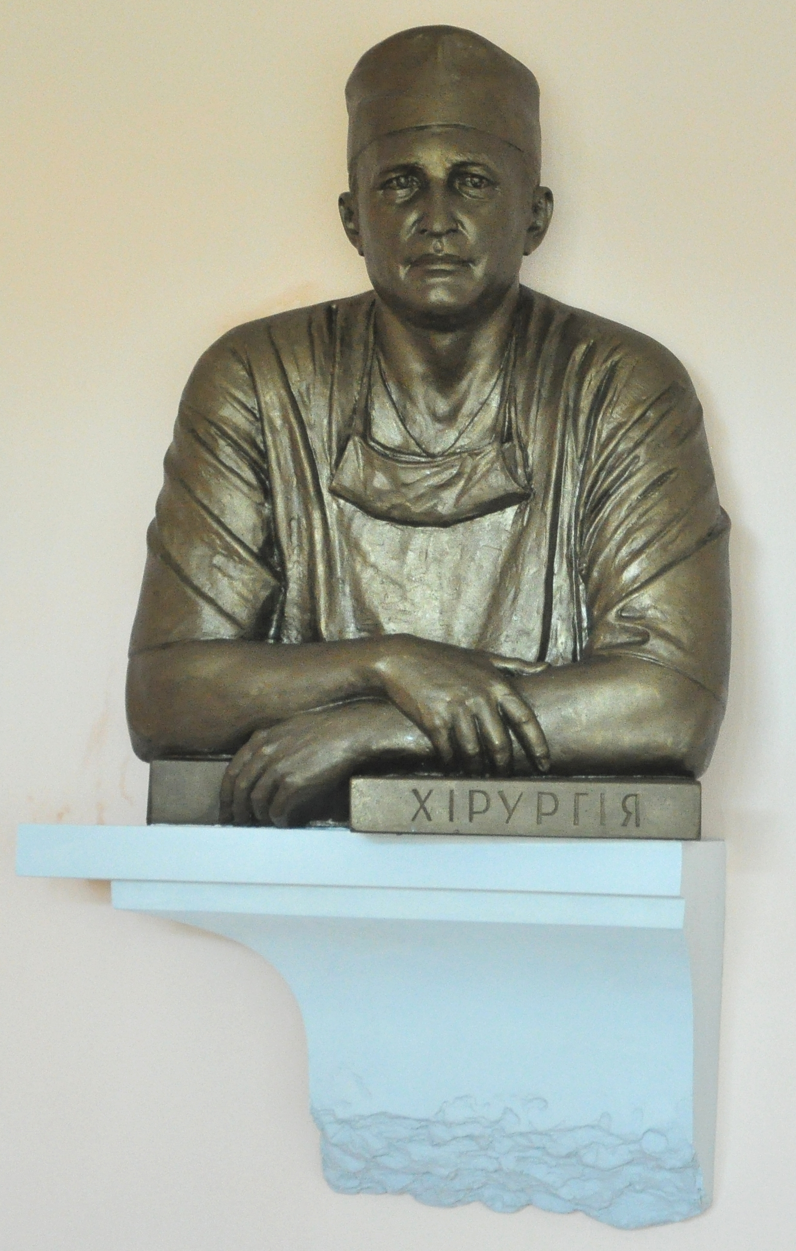 Горельєф українського вченого-хірурга, ректора Тернопільського державного медичного університету Леоніда Якимовича Ковальчука в холі хірургічного відділу Тернопільської університетської лікарні. Автор горельєфа — Володимир Цісарик (м. Львів).